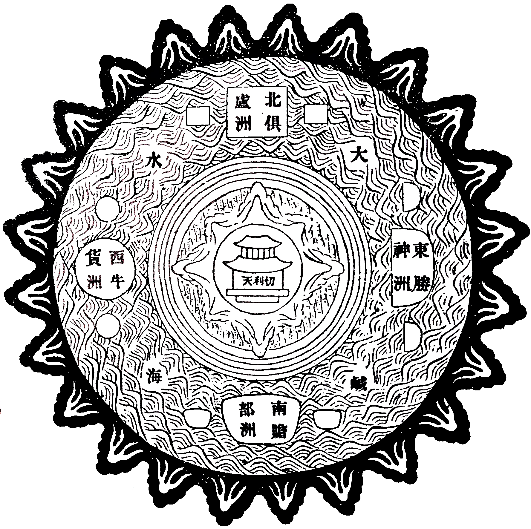 粵語: 四大部洲須彌諸山 大鹹水海